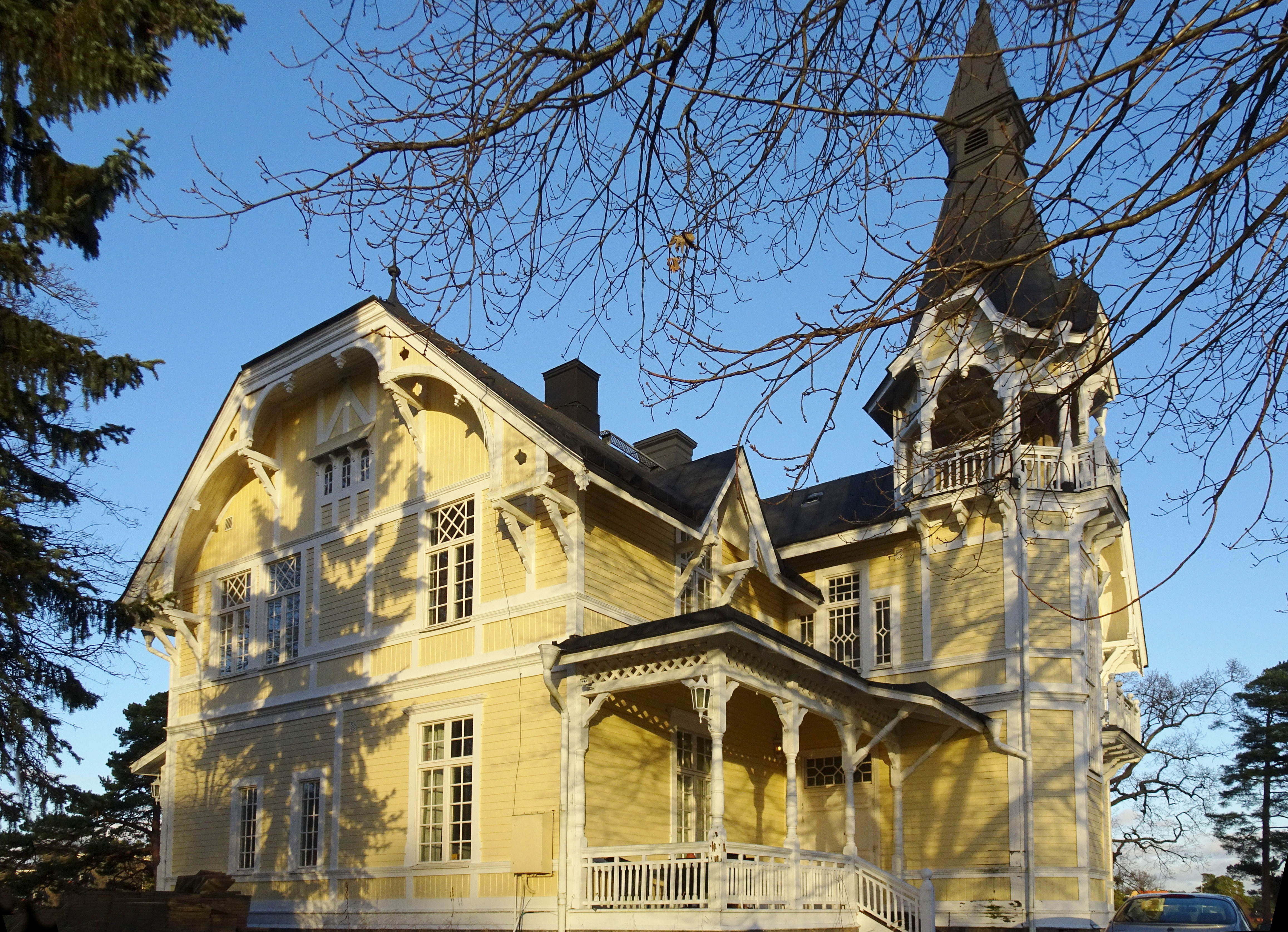 Villa Amalfi i Saltsjöbaden, byggd 1892, arkitekt Edward Ohlsson